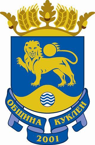 Wappen der Stadt Kuklen (Bulgarien)